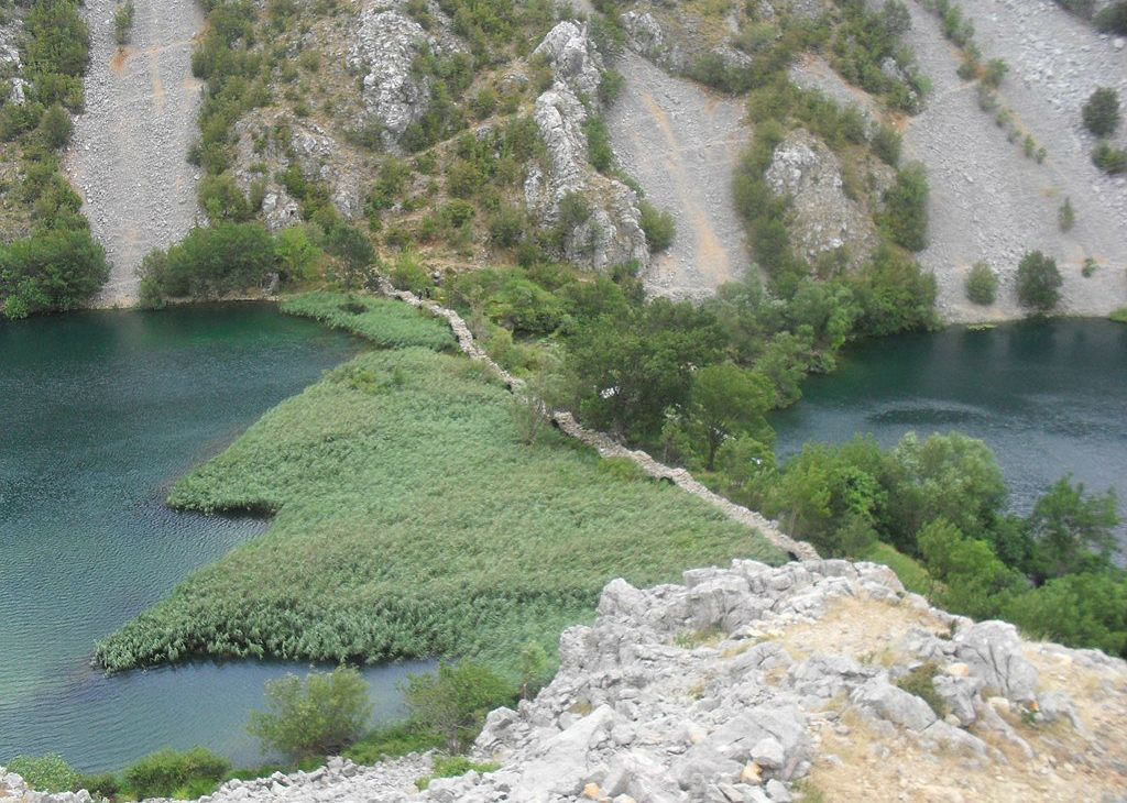 Кудин Мост на ријеци Крупи, Далмација